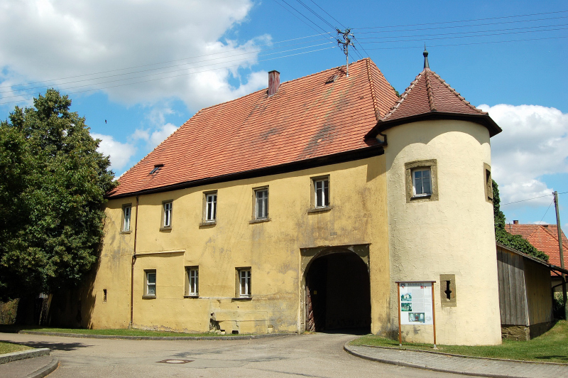 Schloss in Michelbach an der Lücke, Gemeinde Wallhausen, Landkreis Schwäbisch Hall